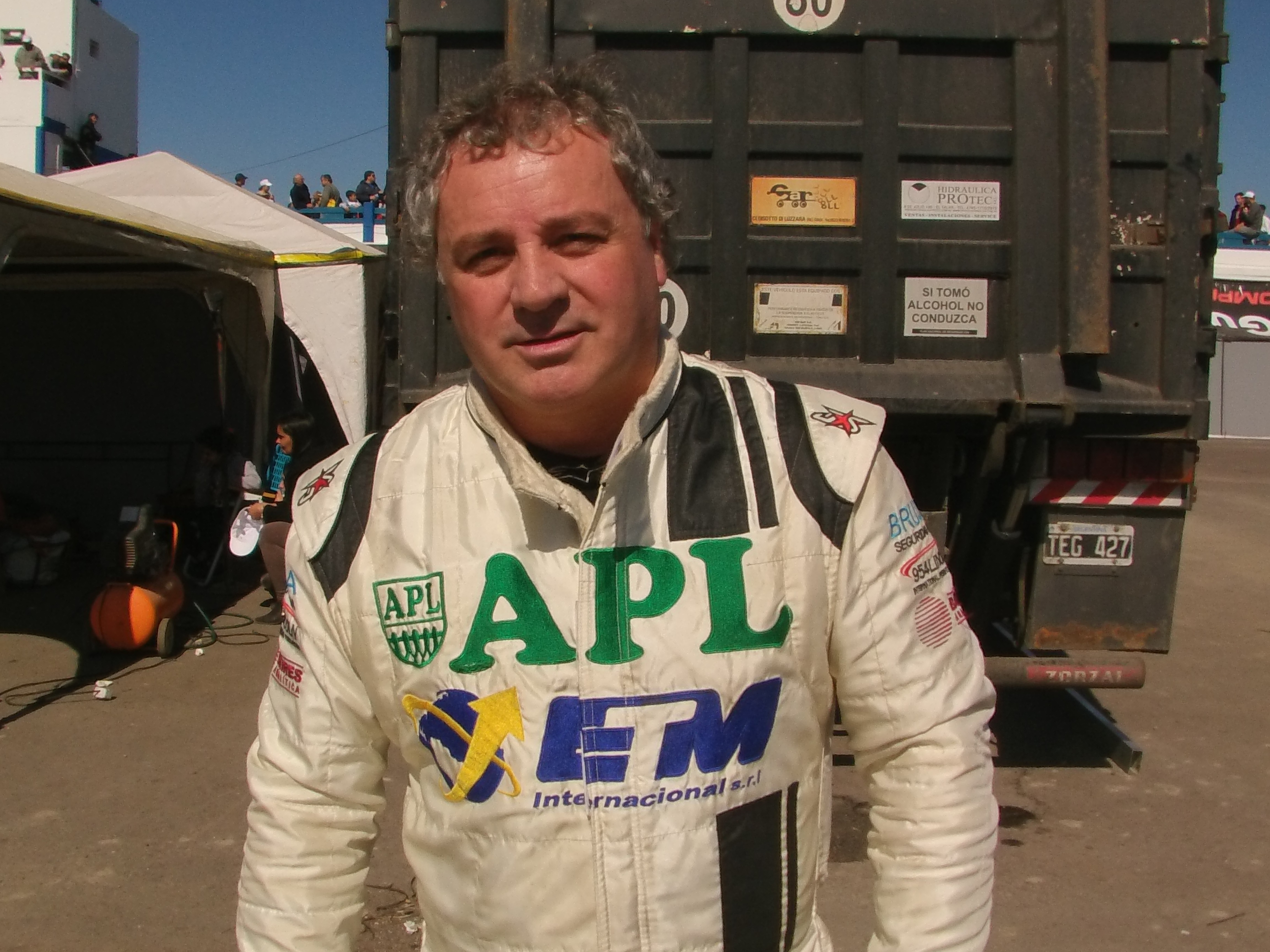 Fotografía del piloto argentino de automovilismo de velocidad, Sergio Guarnaccia.